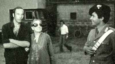 Immagine non artistica dell'attrice Paola Borboni, in compagnia del marito Bruno Vilar (Italy, 1973).